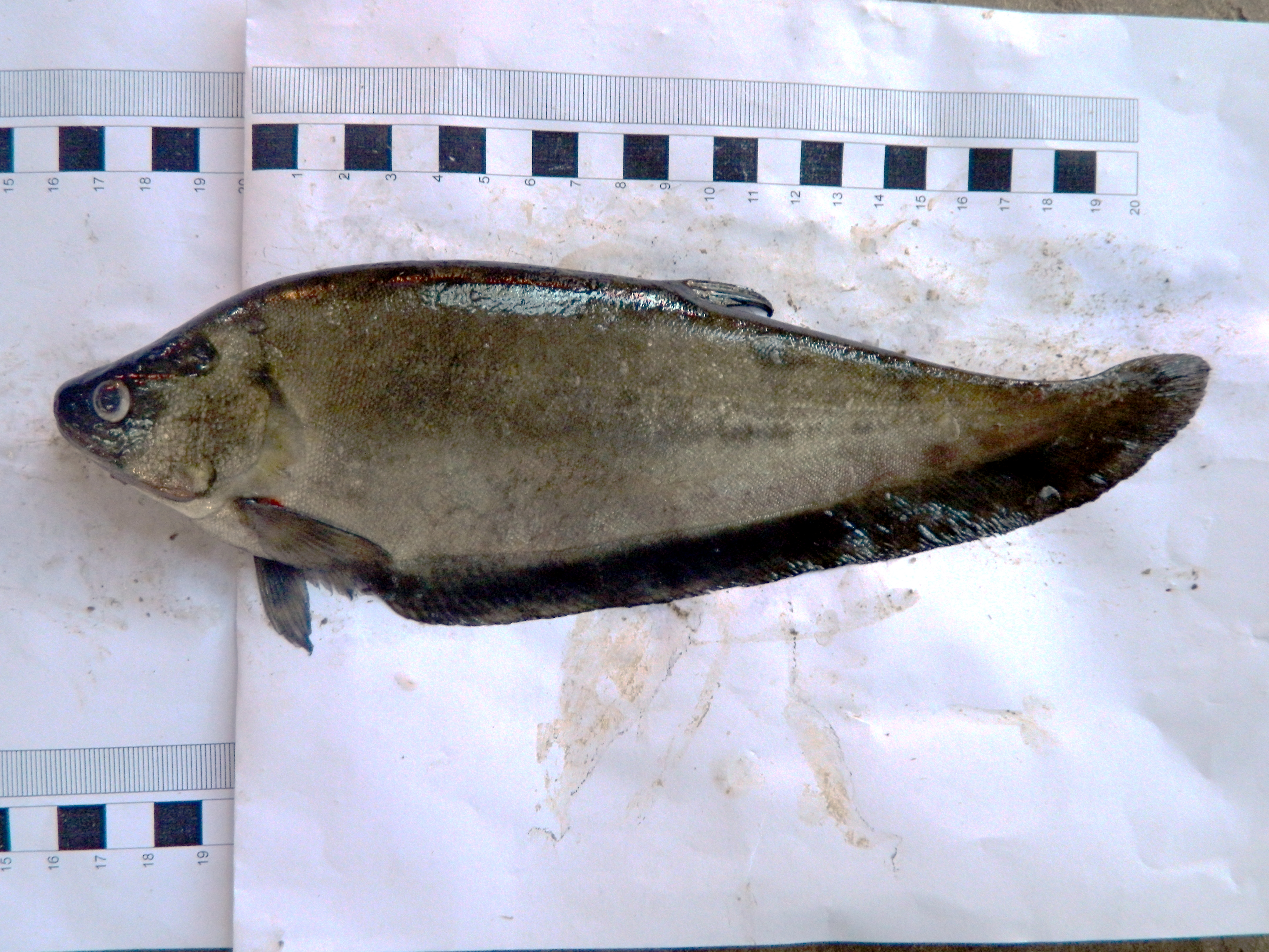 common name-Bronze featherback Scientific Name- Notopterus notopterus Location- Village- Jambhali village,Tal- Arjuni Morgaon,Dist- Gondia